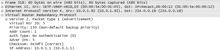 Romani čhib: Captura pachet VRRP